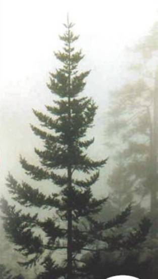 Abies guatemalensis, San Miguel Park, Totonicapan, Guatemala